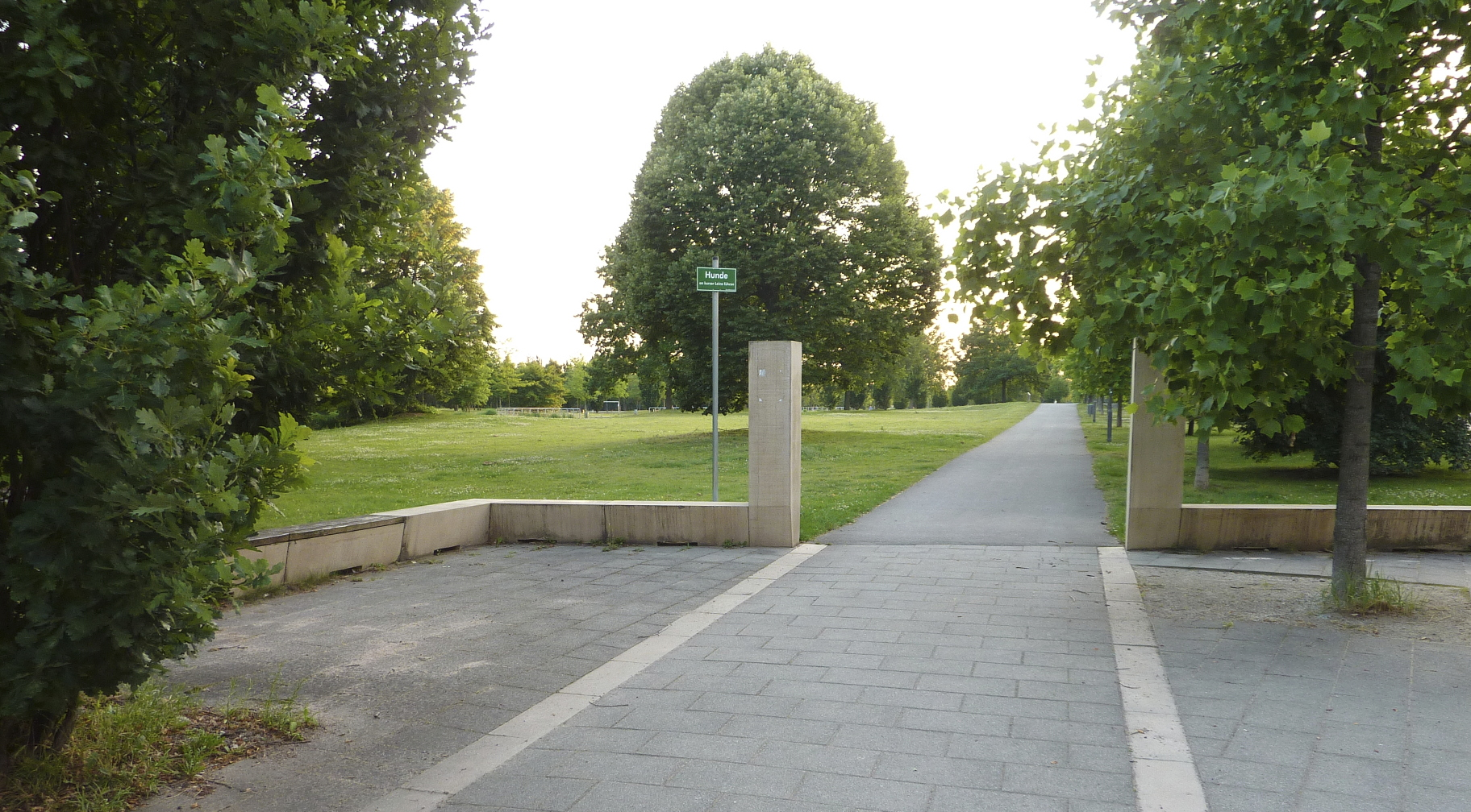 Frankfurt am Main, Stadtteil Bockenheim, Rebstockviertel: Der Neue Rebstockpark ist eine im Jahr 2005 eröffnete öffentliche Grünanlage, gestaltet im Stil moderner Landschaftsarchitektur. Das Foto zeigt den nordöstlichen Zugang zum Park, Blick nach Westen